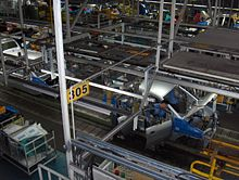 Hyundai fabrikako mihiztatze-lerroa